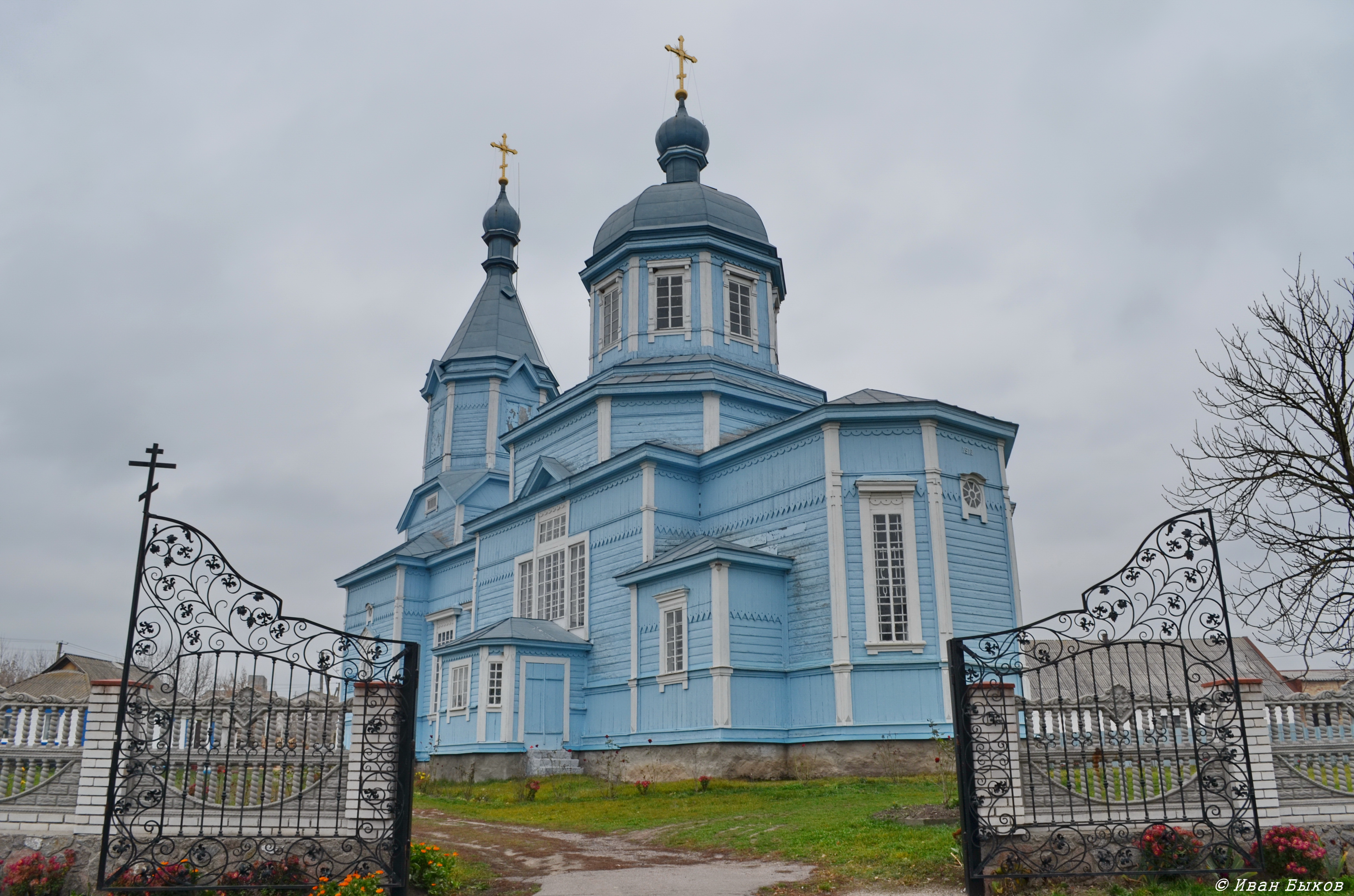 Владиславка. Церква Різдва Богородиці. 1910 р. Архітектор - Євген Єрмаков